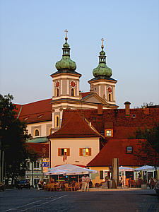 Die Stiftsbasilika - das Wahrzeichen von Waldsassen, im Licht der untergehenden Sonne